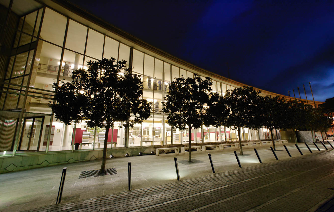 Imatge de la façana de la Cambra del Comerç de Terrassa.